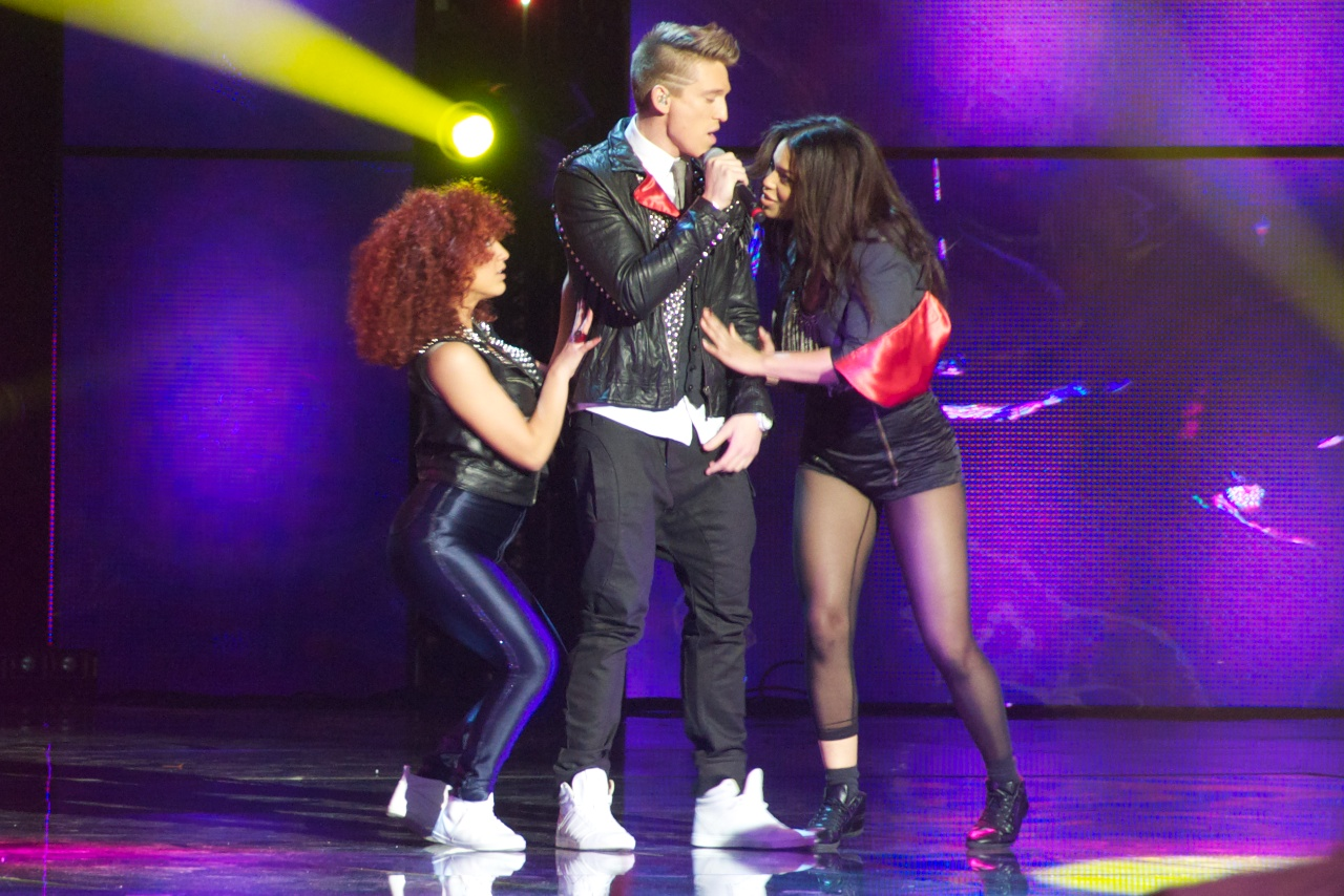 Melodifestivalen 2011 - Genrep i Luleå Danny Saucedo